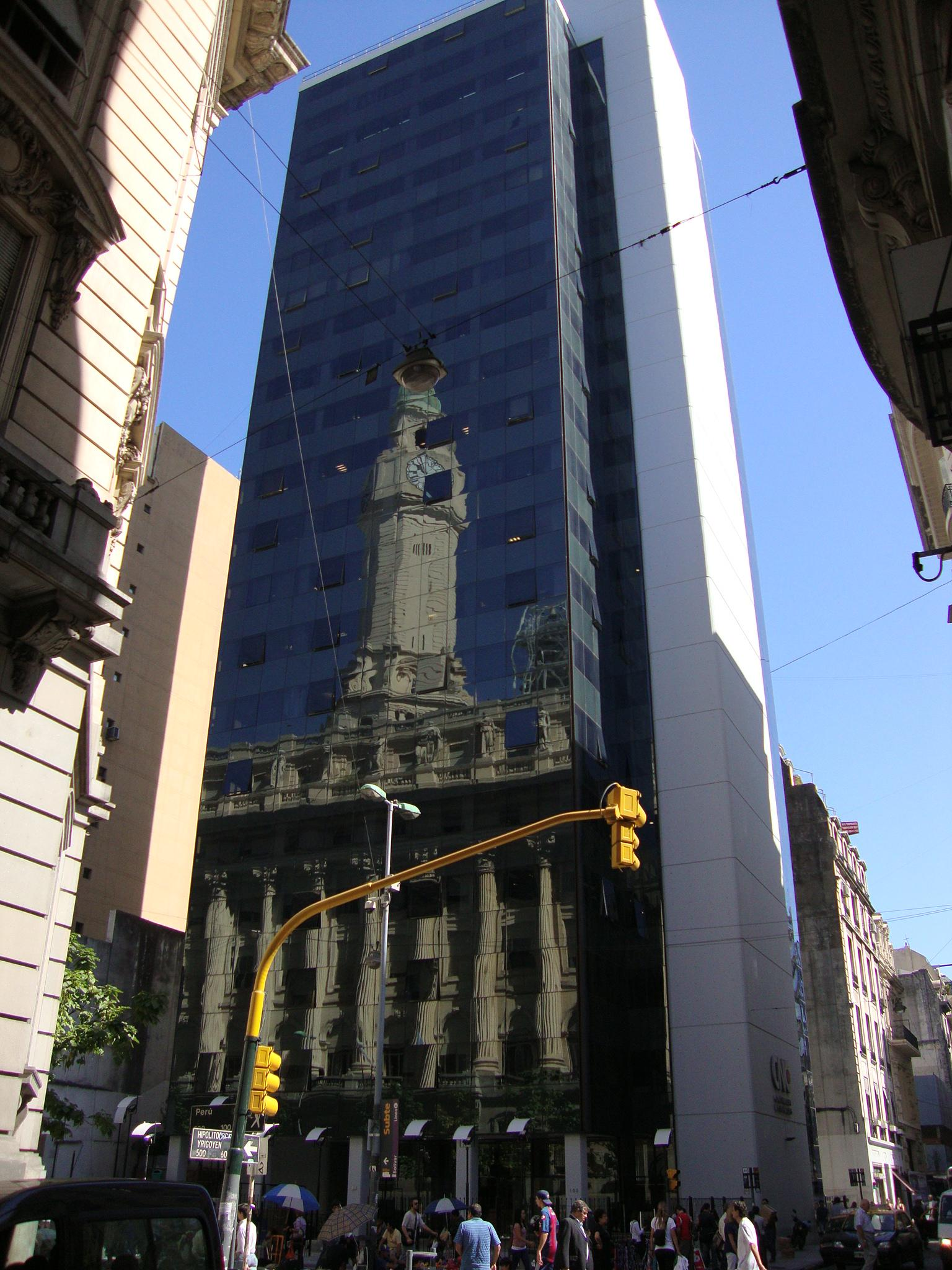 Torre de la Comisión Nacional de Comunicaciones, frente al Palacio de la Legislatura de Buenos Aires. Calle Perú 103 (esq. Hipólito Yrigoyen). Buenos Aires, Argentina.